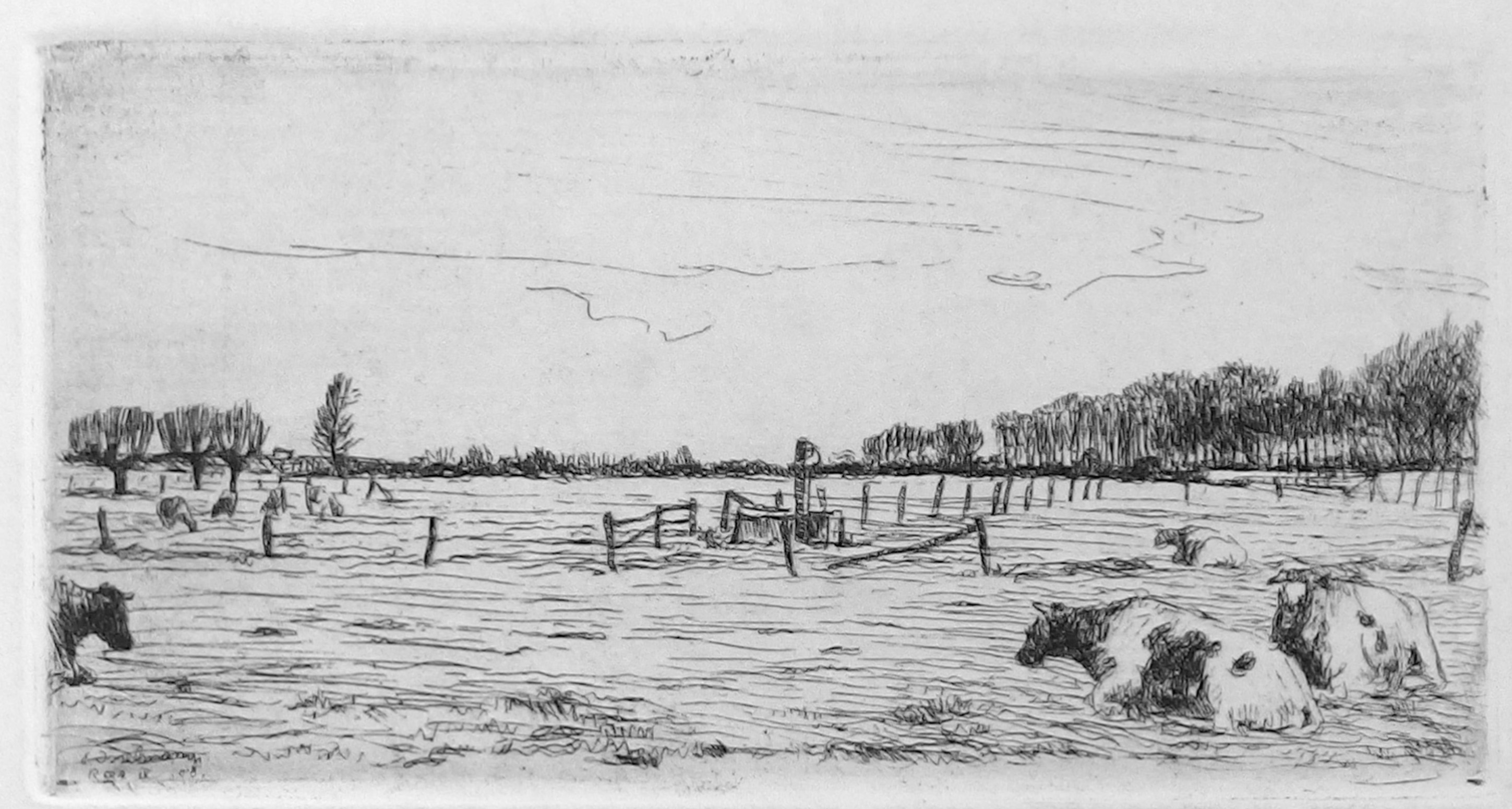 Rees im September 1908 - Radierung von Ernst Isselmann (1885-1916)